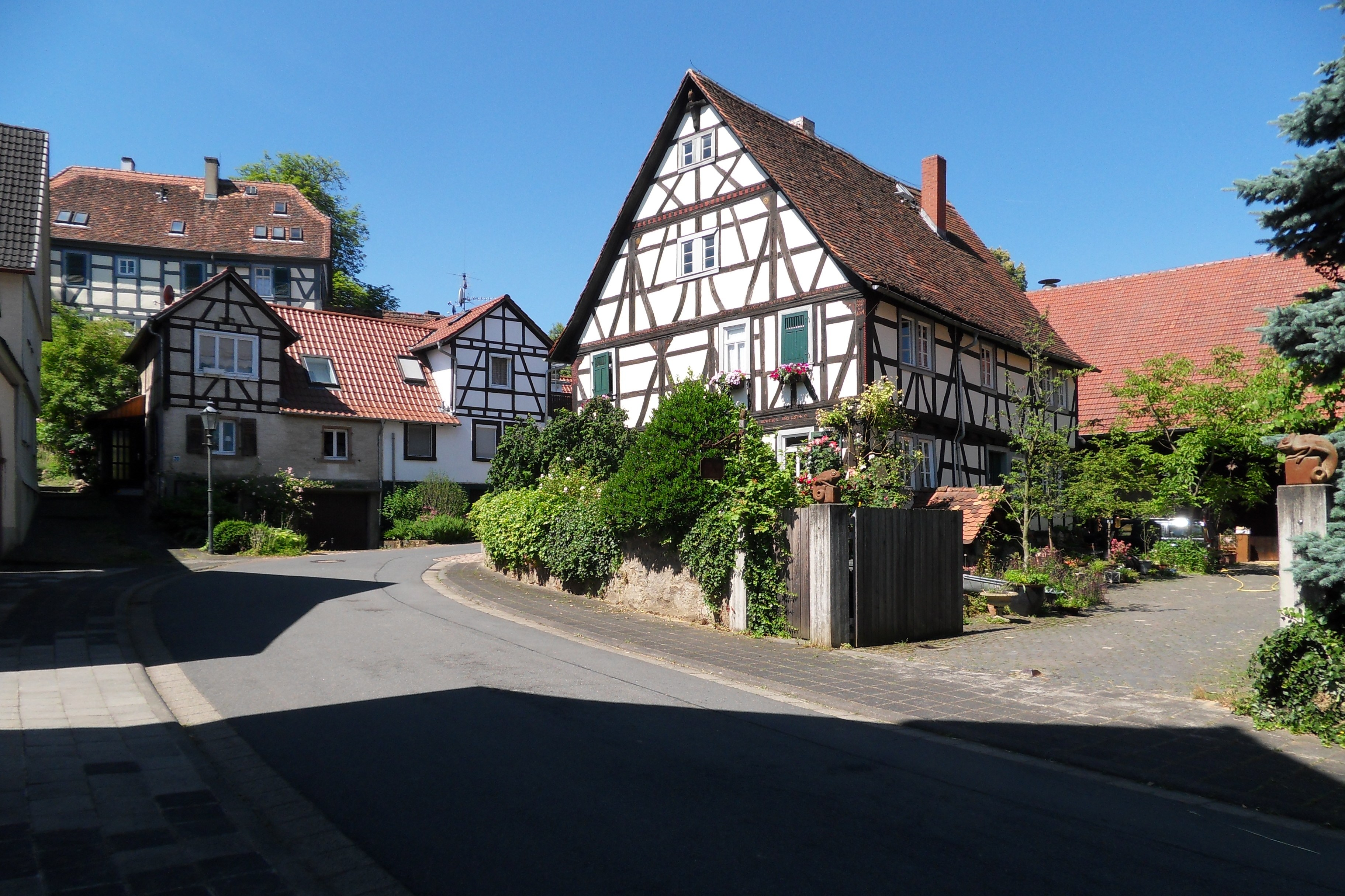 Blick in die Biegung der Schulstraße in Wersau; rechts das denkmalgeschützte Fachwerkwohnhaus eines Dreiseithofes in der Schulstraße 15, ältestes Fachwerkhaus in Wersau von 1614, ganz oben in beherrschender Lage das Fachwerkwohnhaus des denkmalgeschützten Anwesens Pfarrberg 2, dazwischen das Doppelhaus Schulstraße 20 und 22 mit Fachwerkobergeschoss